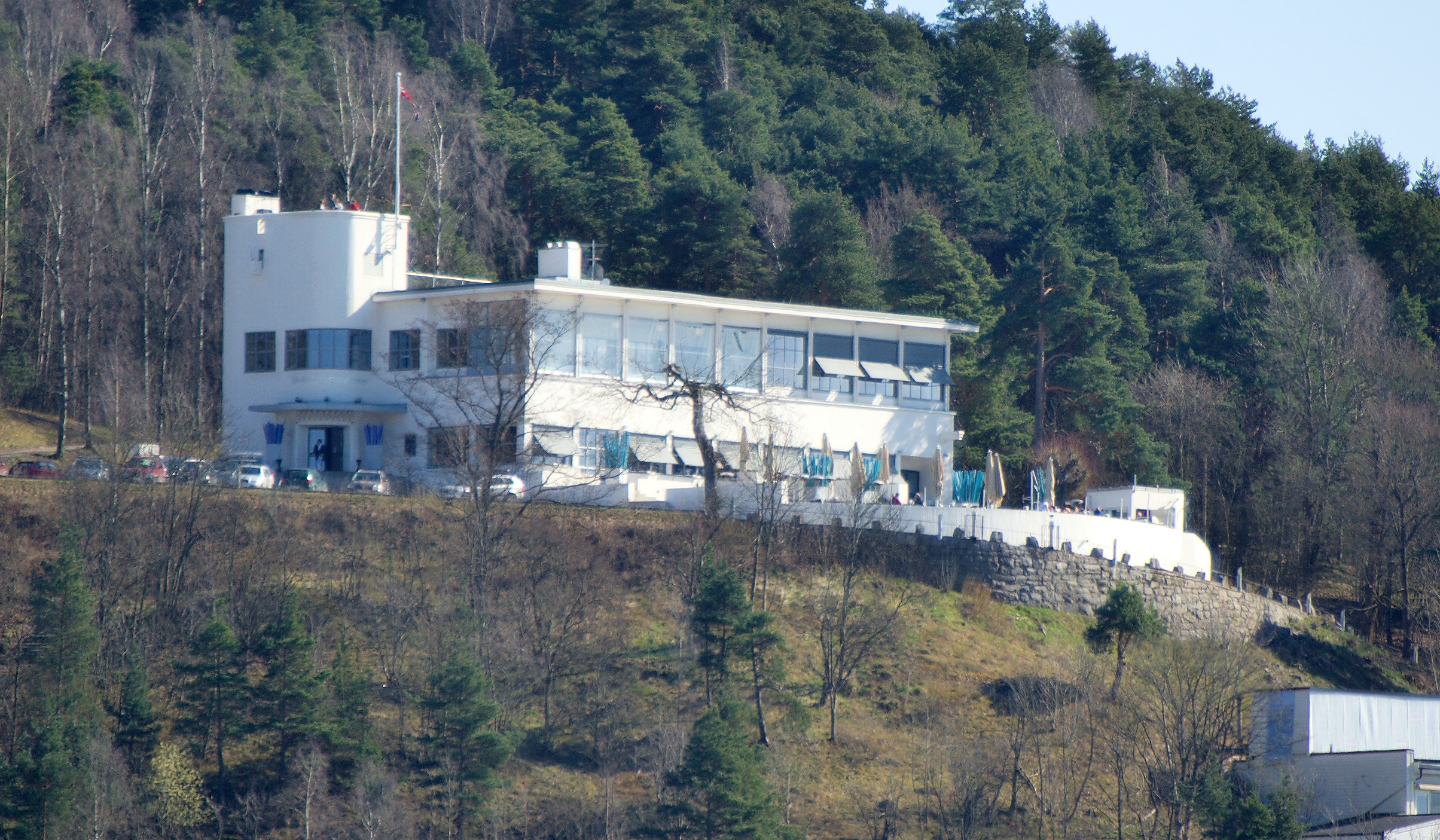 Ekeberg restaurant Oslo, Norway, April 2008 © 2005, 2006, 2007 by Bjørn Erik Pedersen Licensing:[edit]